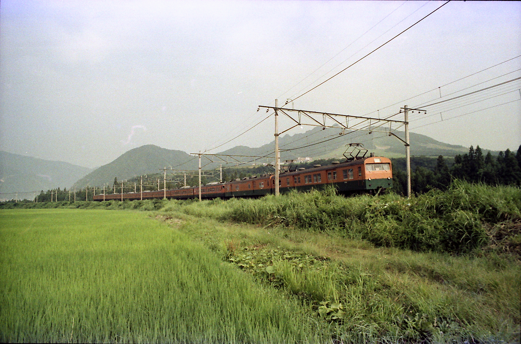 上越線 越後中里駅-岩原スキー場前駅 新潟県南魚沼郡湯沢町大字土樽